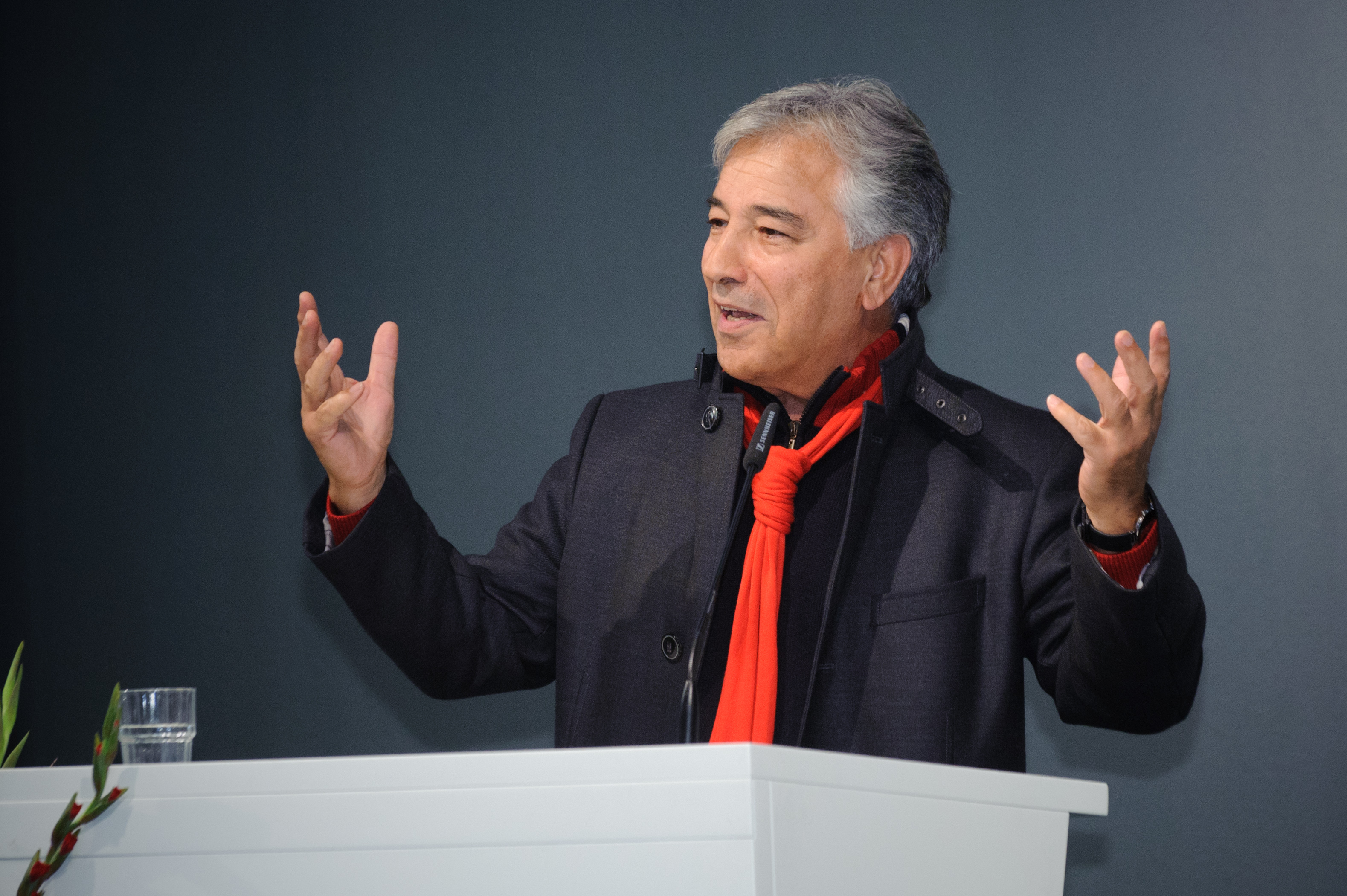 Prof. Nasser Kanani (Wissenschaftler)